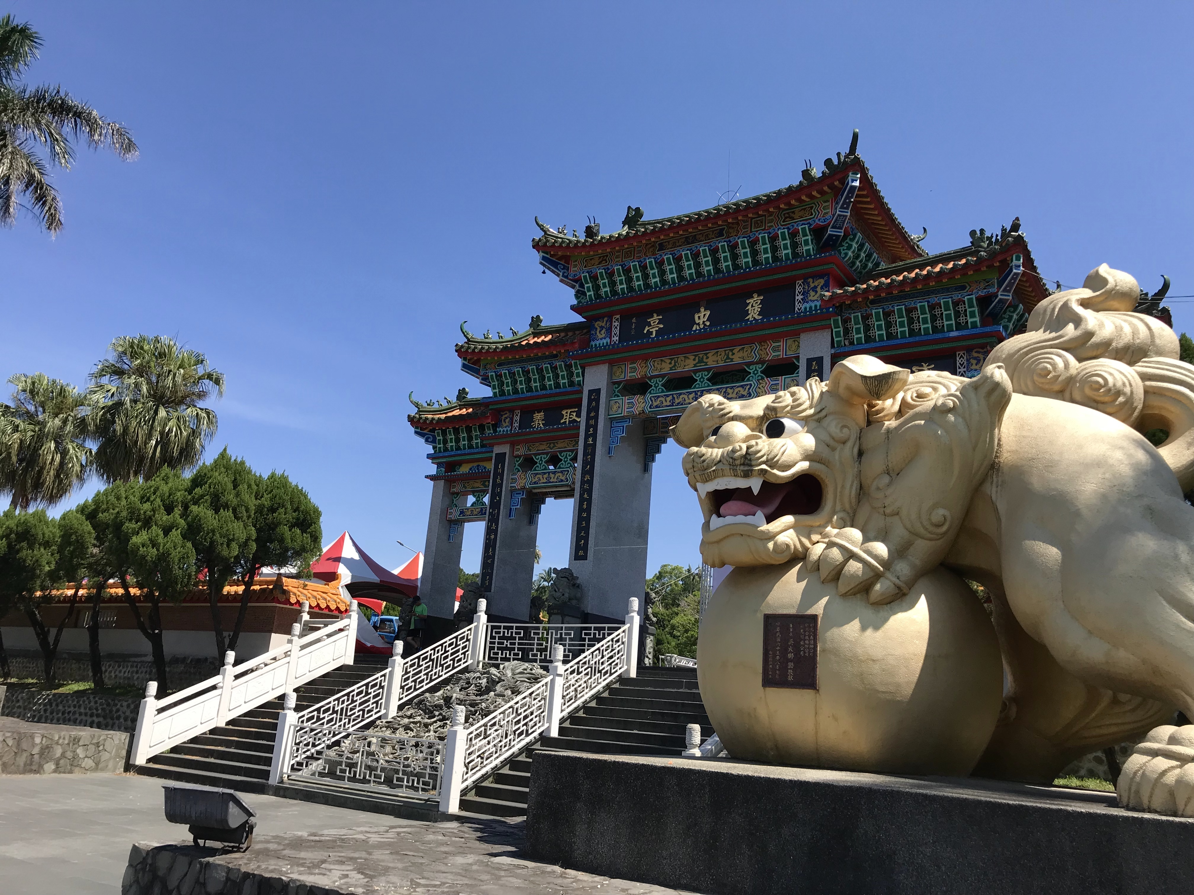 褒忠亭義民廟牌前石獅